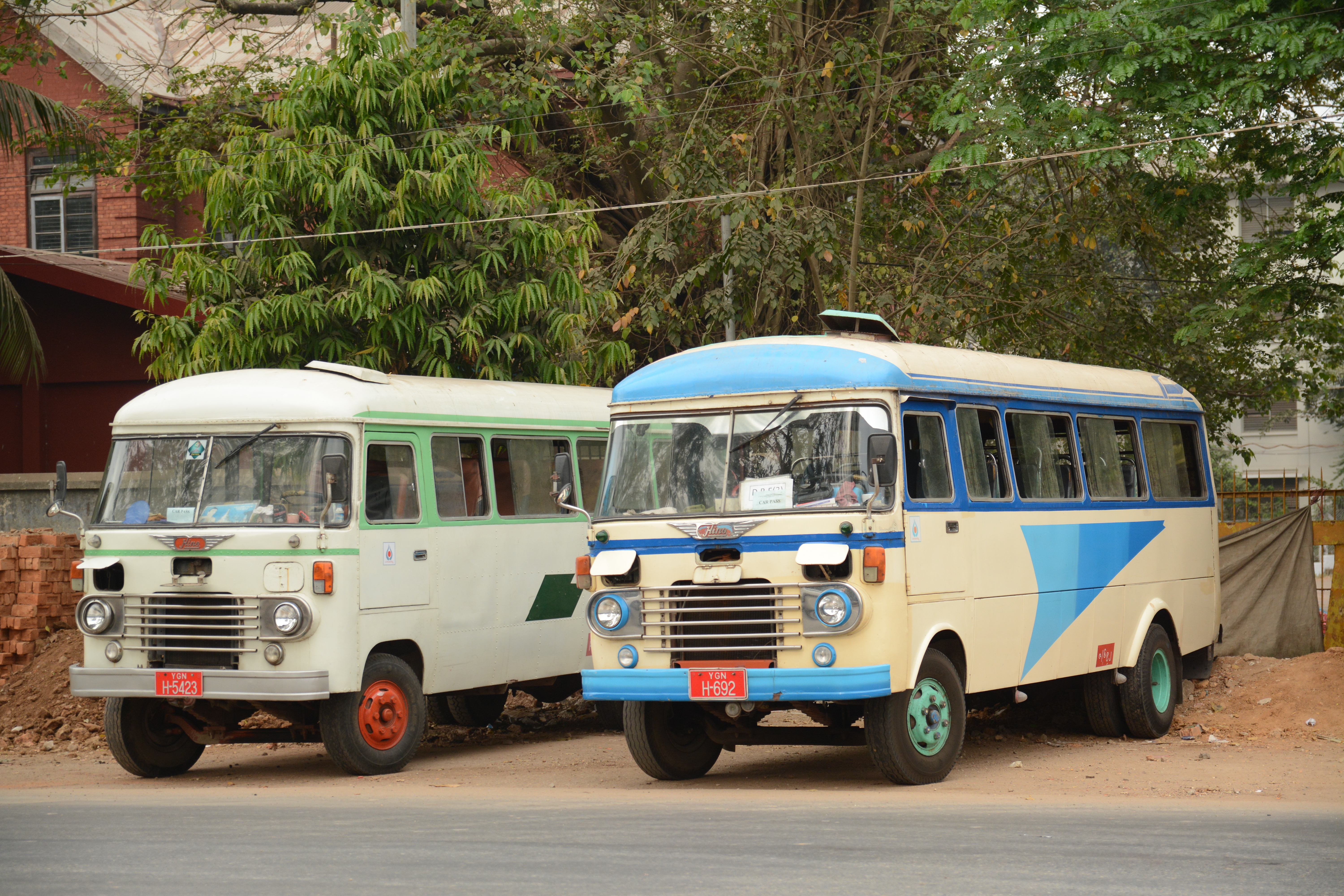 Yangon Bus Old Type